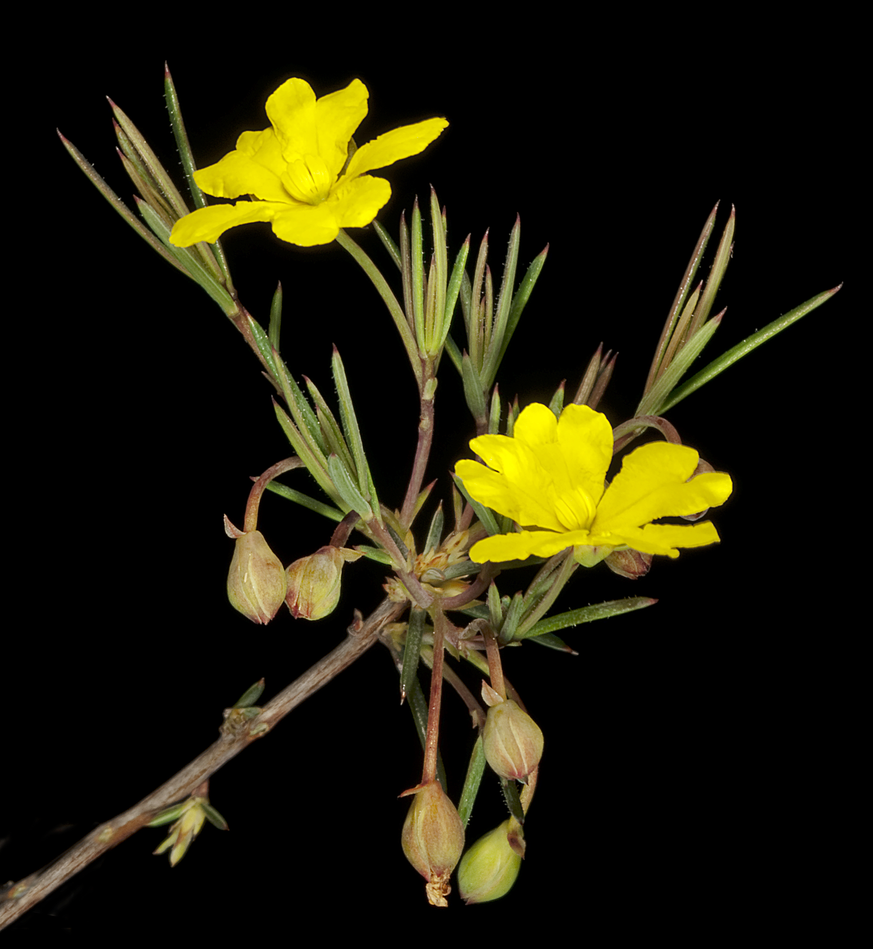 KRT4025